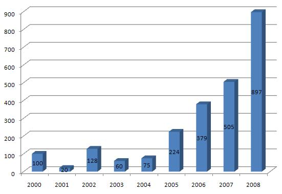 Podaż robotów przemysłowych w Polsce według World Robotics 2009